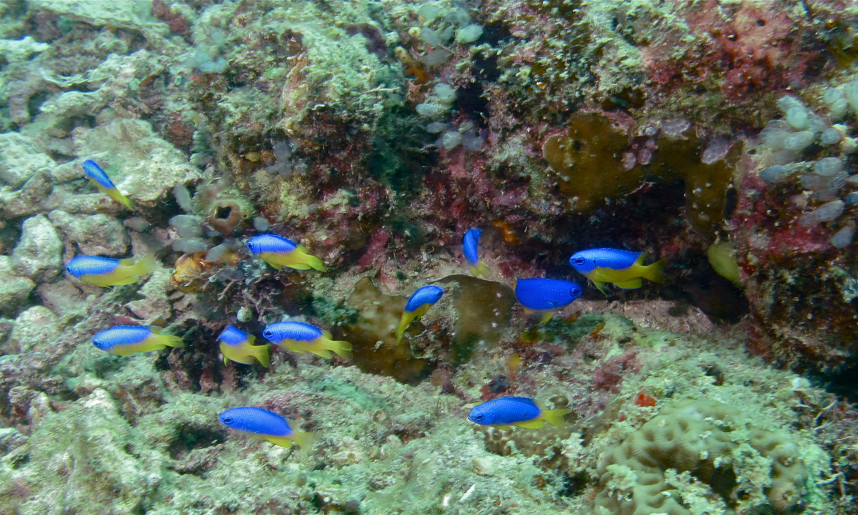 House Reef, Kapalai Island, Sabah, MALAYSIA